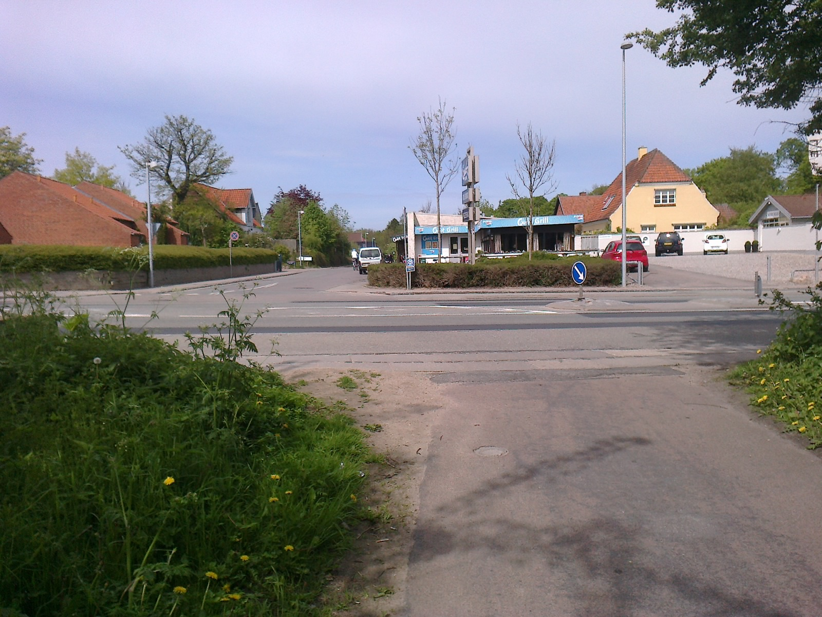 Søhusstien afbrydes ved Bogensevej